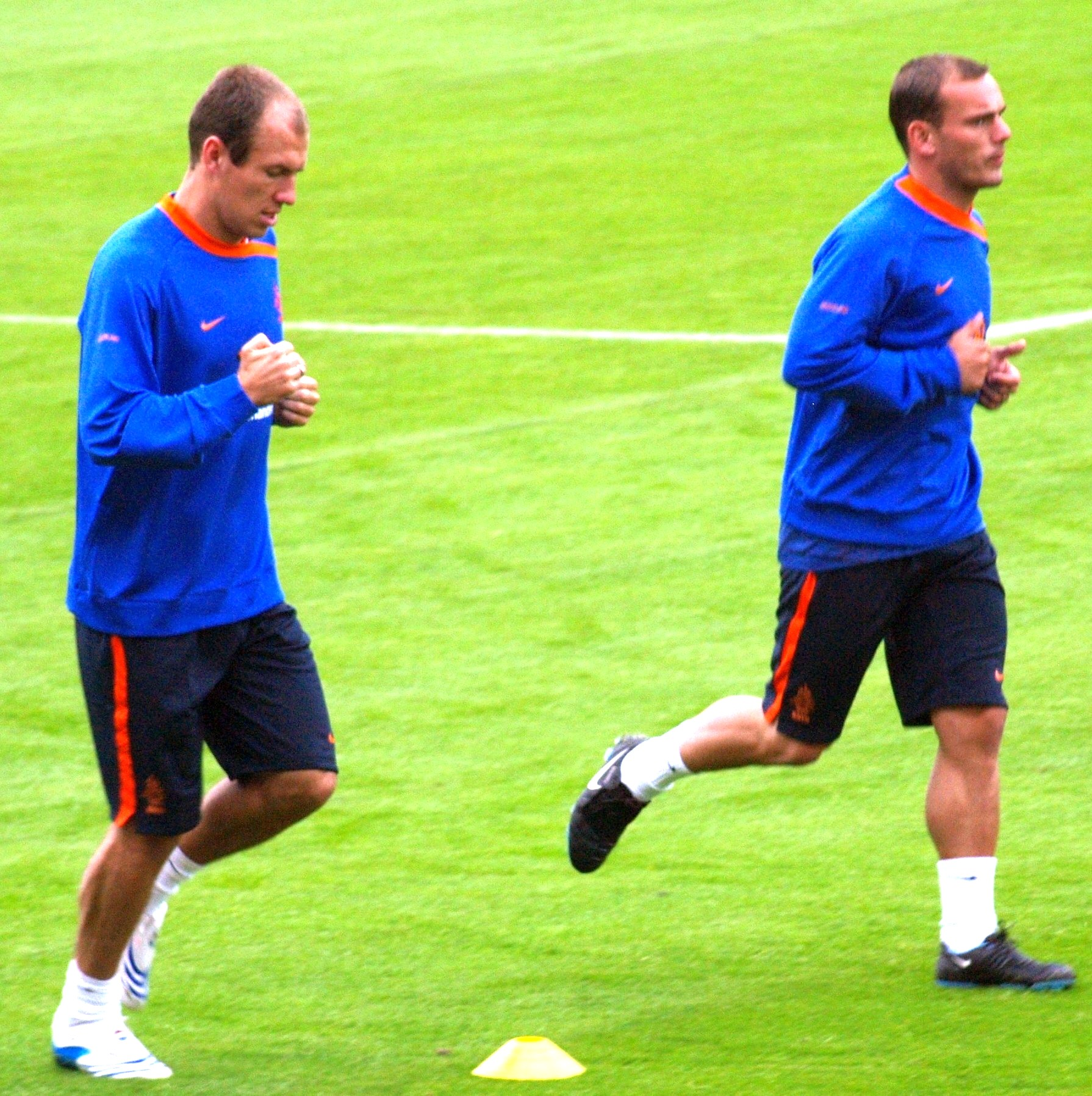 Arjen Robben and Wesley Sneijder